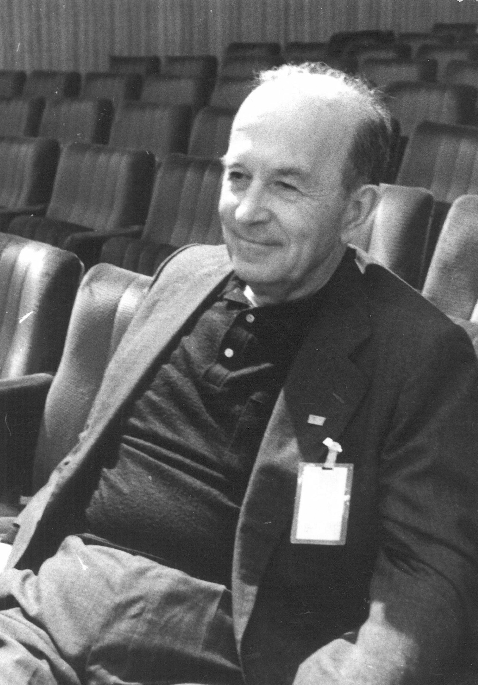 Svetozar Vukmanović Tempo (1912−2000)društveno-politički radnik SFRJ i narodni heroj Jugoslavije.Foto:Stevan Kragujević (po odobrenju kćerke Tanje Kragujević)